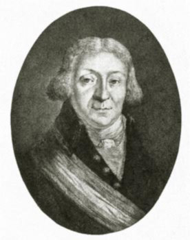 Pierre-Maurice Glayre, (25.7.1743, Romainmôtier–26.3.1819 Lausanne), schweizerisch-polnischer Politiker und Diplomat. Privatsekretär und persönlicher Berater von Stanislaus Poniatowski, führender Politiker der Helvetischen Republik und des Kantons Waadt.